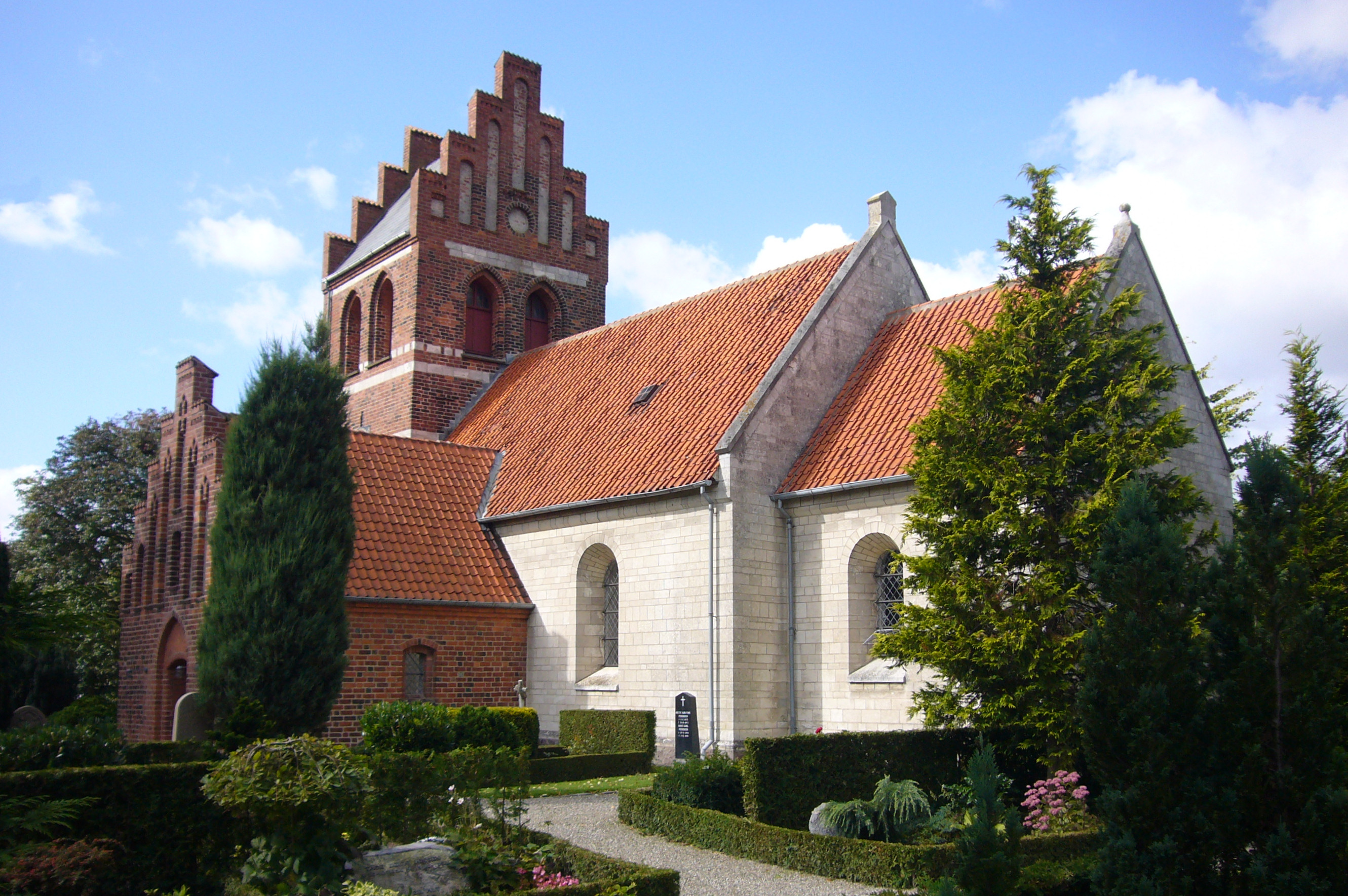 Herstedvester Kirke, Albertslund, Denmark. Herstedvester Kirke